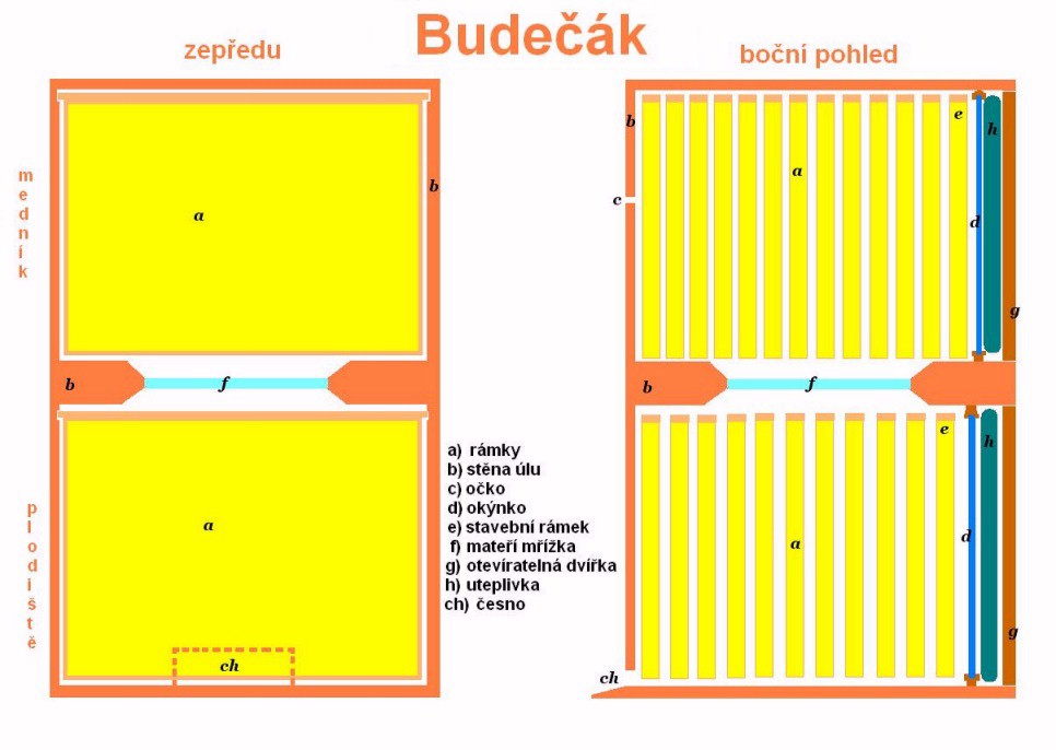 Vlastnoruční náčrt předního a bočního průřezového nahledu do úlu Budečák